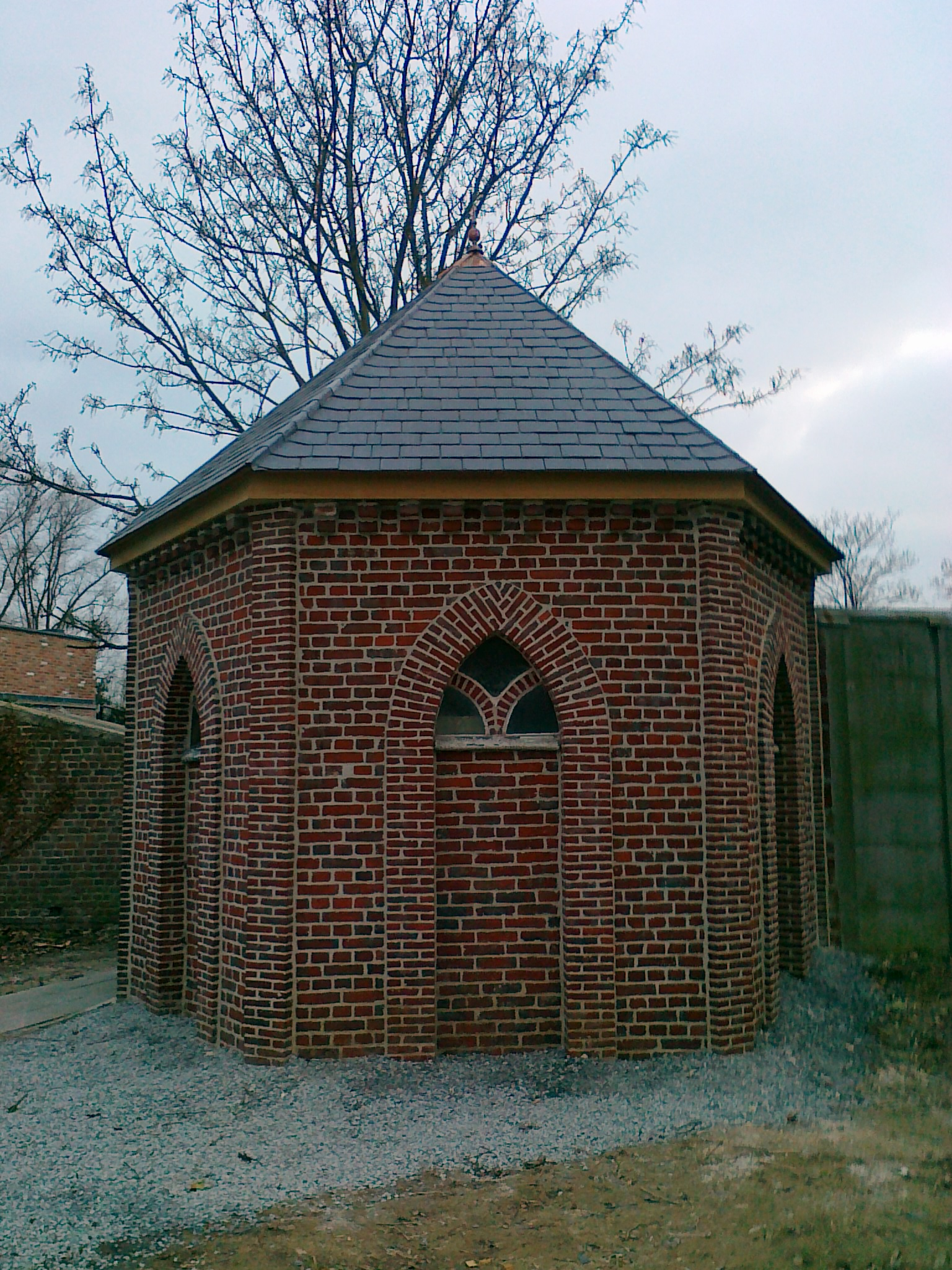 Het voormalige dodenhuisje of lijkenhuisje (dodenhuizeken genoemd) van Bambrugge is gerestaureerd, er is een nieuw dak op gezet.